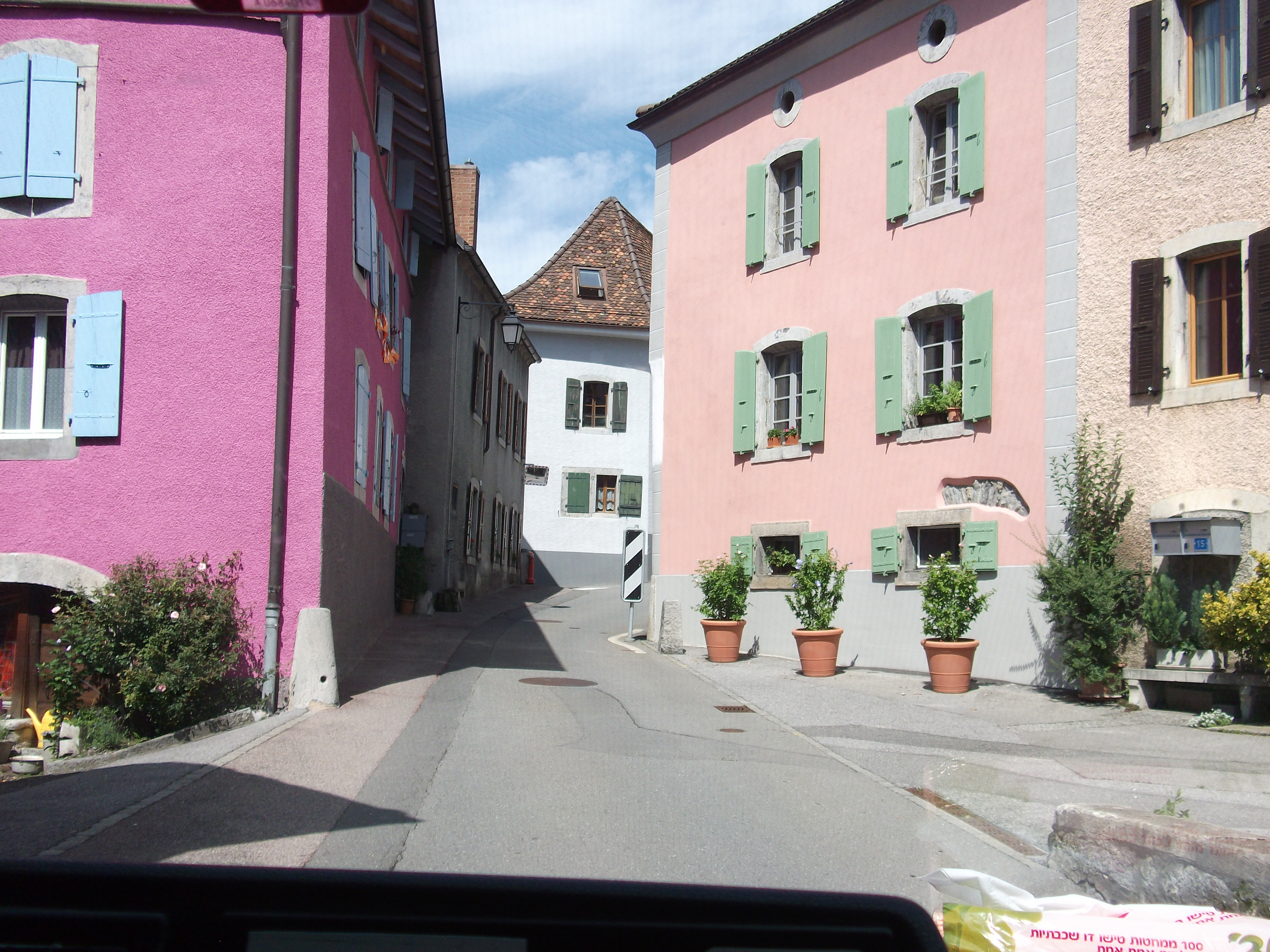 סמטה בעיר אולון